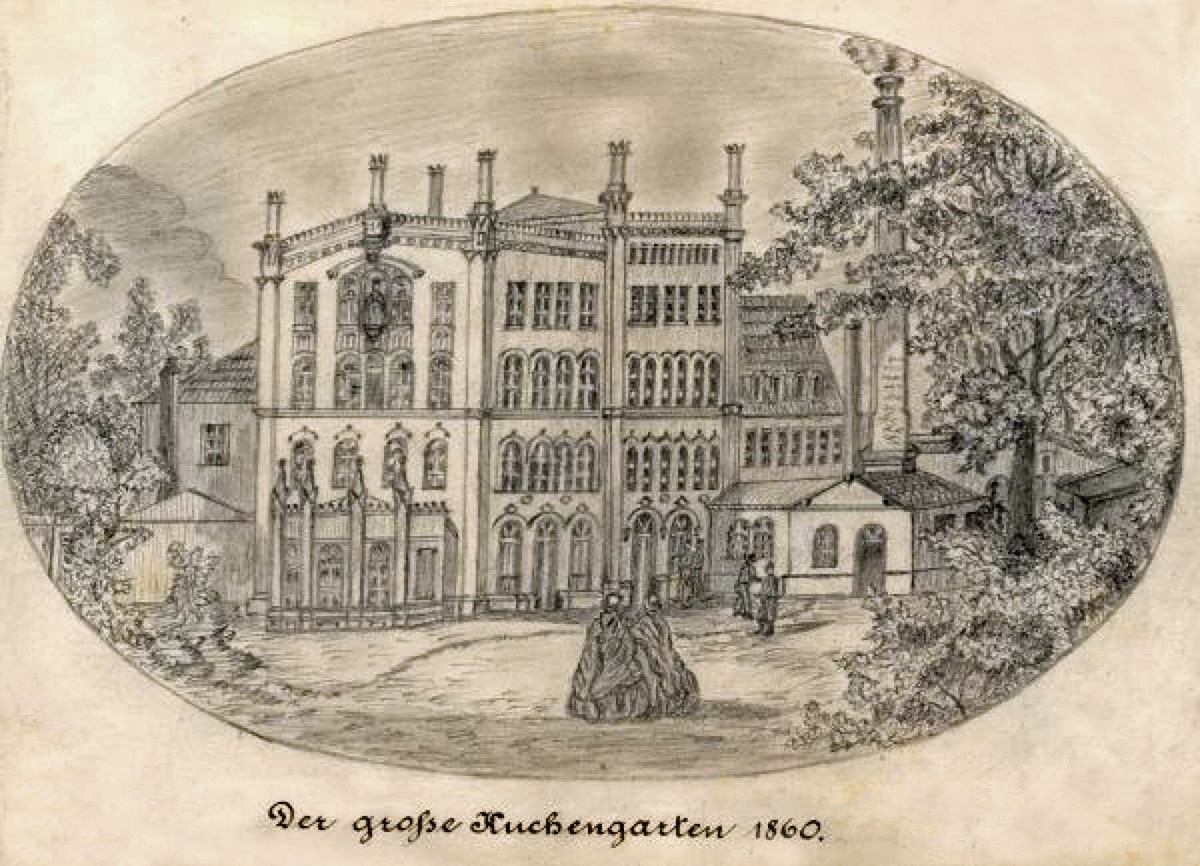 Der Große Kuchengarten in Leipzig 1860